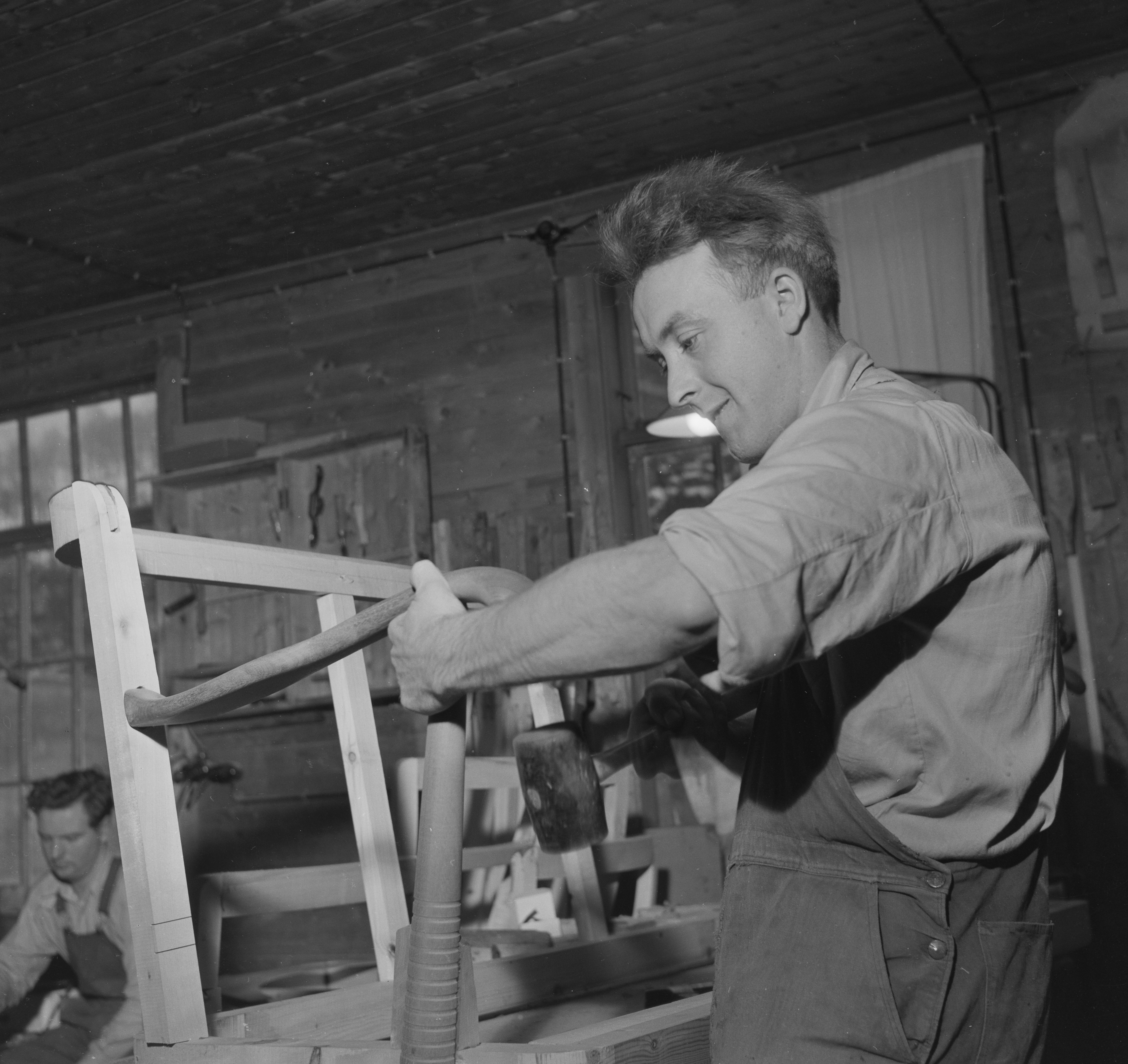 Bildet er hentet fra Arkivverket. P. I. Langlos Fabrikker, Stranda. NÅ nr. 1, 1953 Arkivinstitusjon : Riksarkivet Arkivnavn : Billedbladet NÅ Sted : Norge, Møre og Romsdal, Stranda, Emneord: Møbelfabrikk, Industri, P.I. Langlos Fabrikker, Sunnmøre, Håndverk, Arbeider, Menn, Arbeid, Næringsliv Avbildet